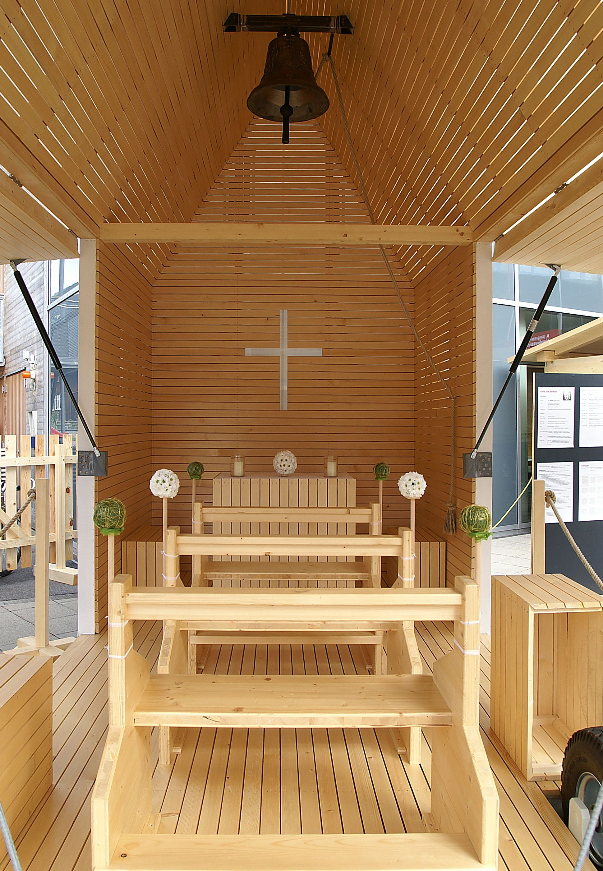 Vorarlberger Holzbaupreis 2007 Sonderpreis, Kategorie: Öffentlicher Bau; Bauherrschaft: SC Austria Lustenau; Planung: Hugo Dworzak, Lustenau; Zur 8. Bregenzerwälder Handwerksausstellung vom 14.-19. August 2007 wird die von Holzbau Stephan Muxel in Au (Vorarlberg) hergestellte Kapelle zum Gedenken an “Kaplan Hugo Kleinbrod” in Bezau ausgestellt. Sie ist die erste Stadion-Kapelle Österreichs und steht im Reichshofstadion Lustenau.